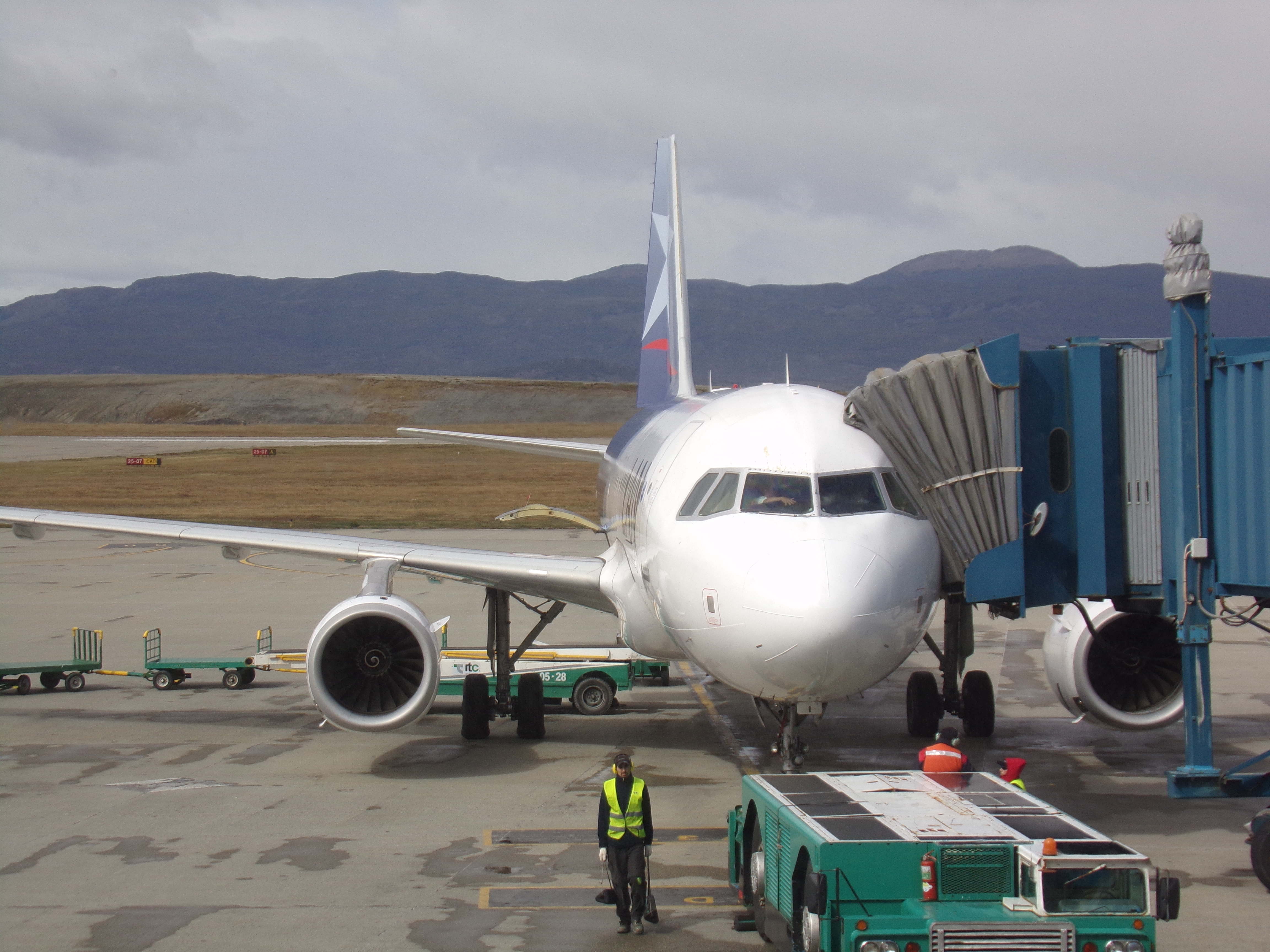 USH - Malvinas Argentinas Airport, Ushuaia, Tierra del Fuego, Argentina